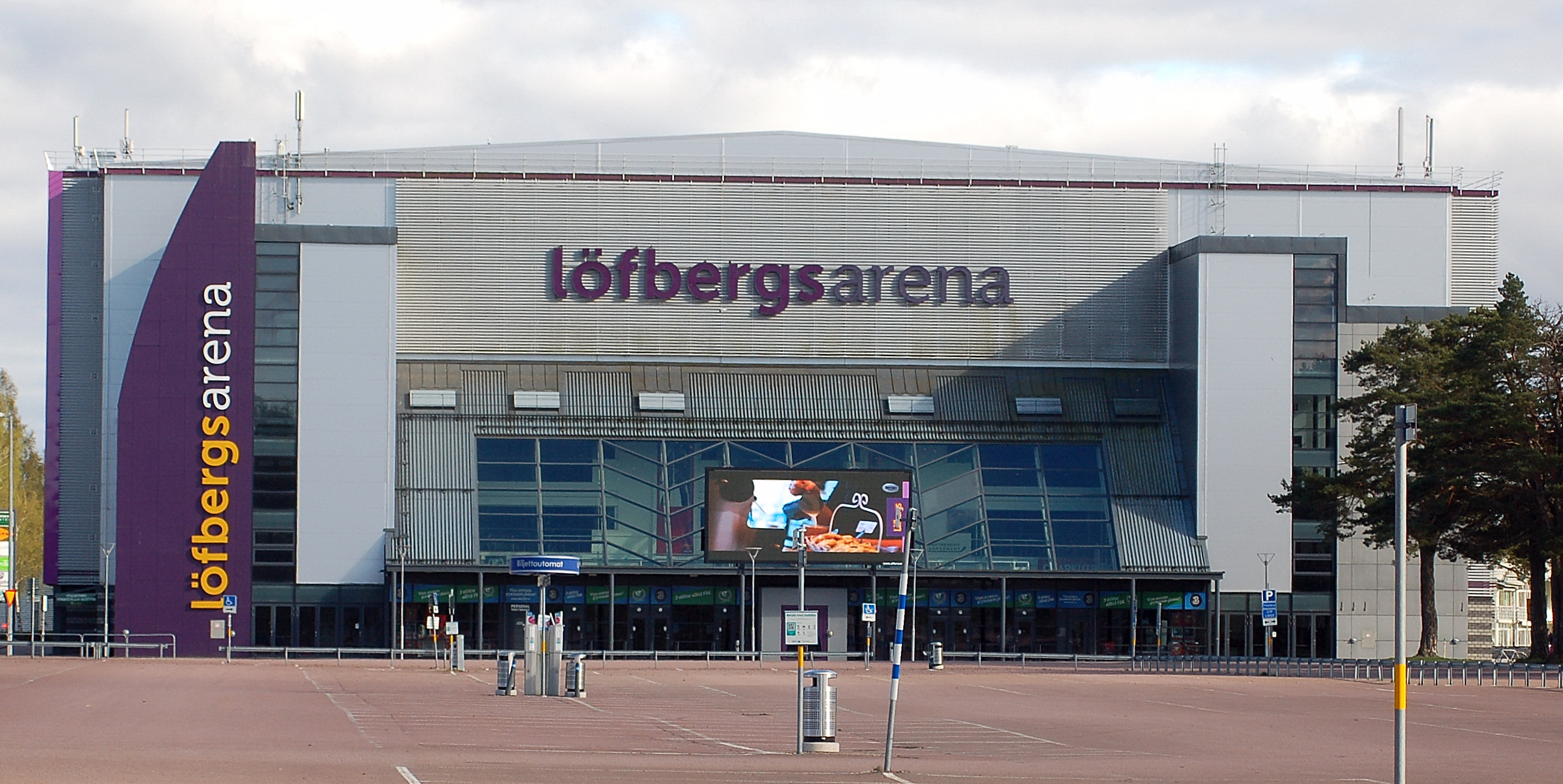 Löfbergsarena norra entrén.